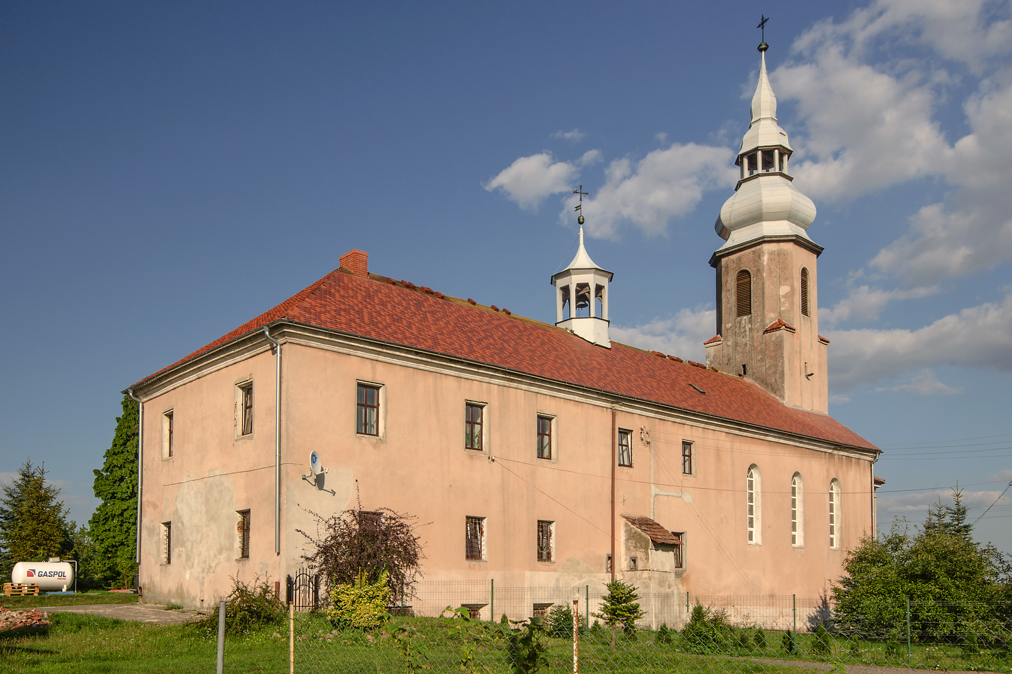 Michałów - pierwotnie kaplica pałacowa, obecnie rzymskokatolicki kościół parafialny p.w. św. Jadwigi, 1715, 1820, 1910